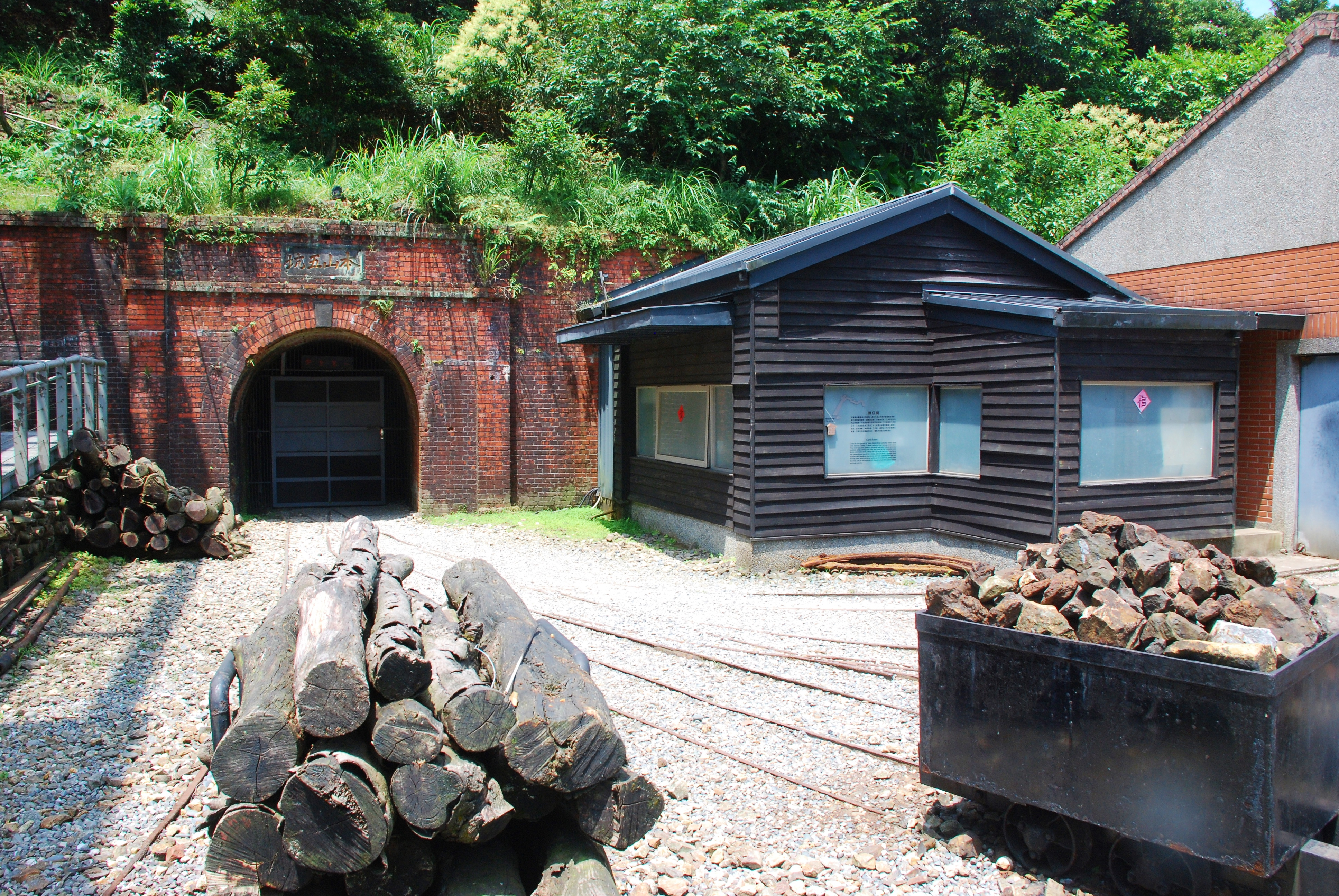 224, Taiwan, 新北市瑞芳區石山里